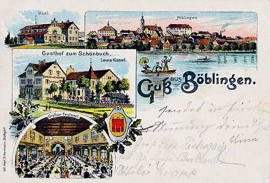 Ansichtskarte „Gruß aus Böblingen“ mit Gesamtansicht der Stadt sowie drei Einzelansichten: „Gasthof zum Schönbuch“ sowie „Großer Saal“ (außen und innen).